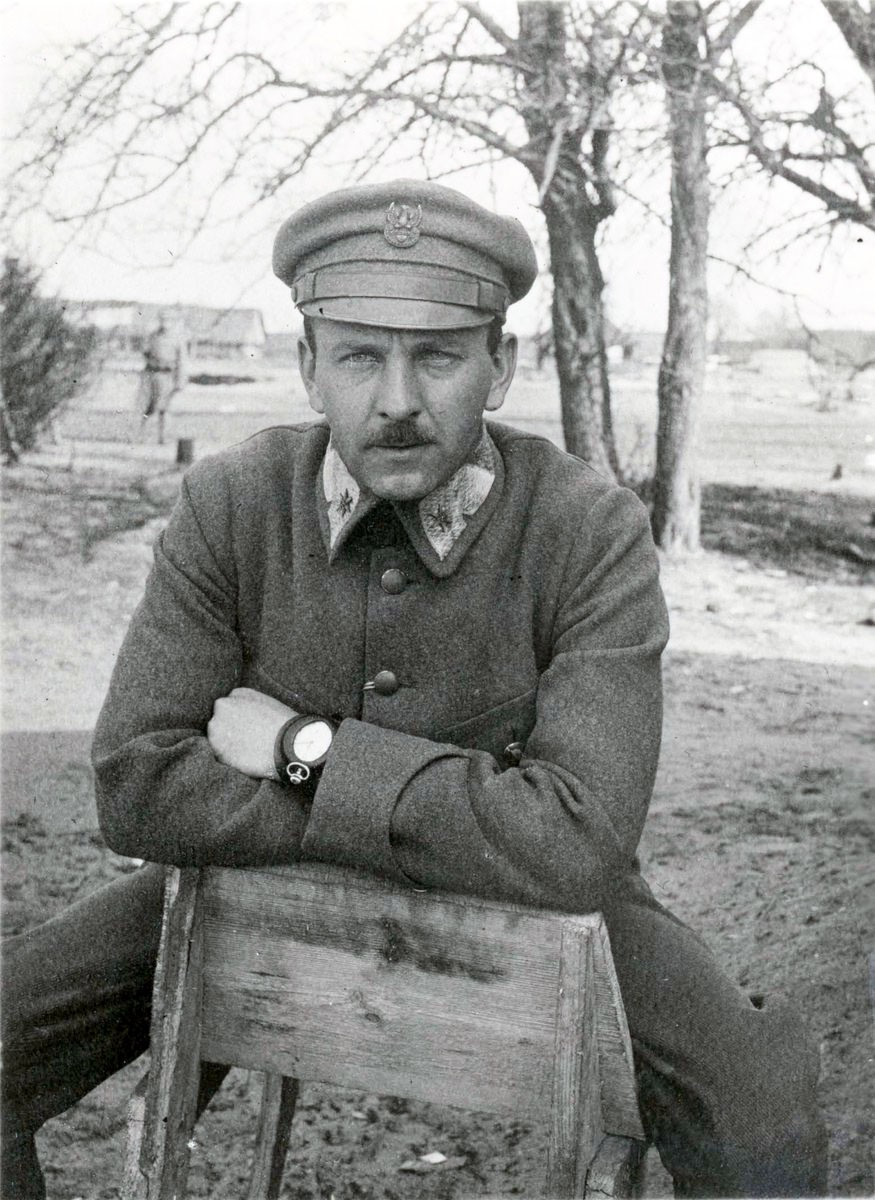 Major Kazimierz Fabrycy. Okres Legionów Polskich.